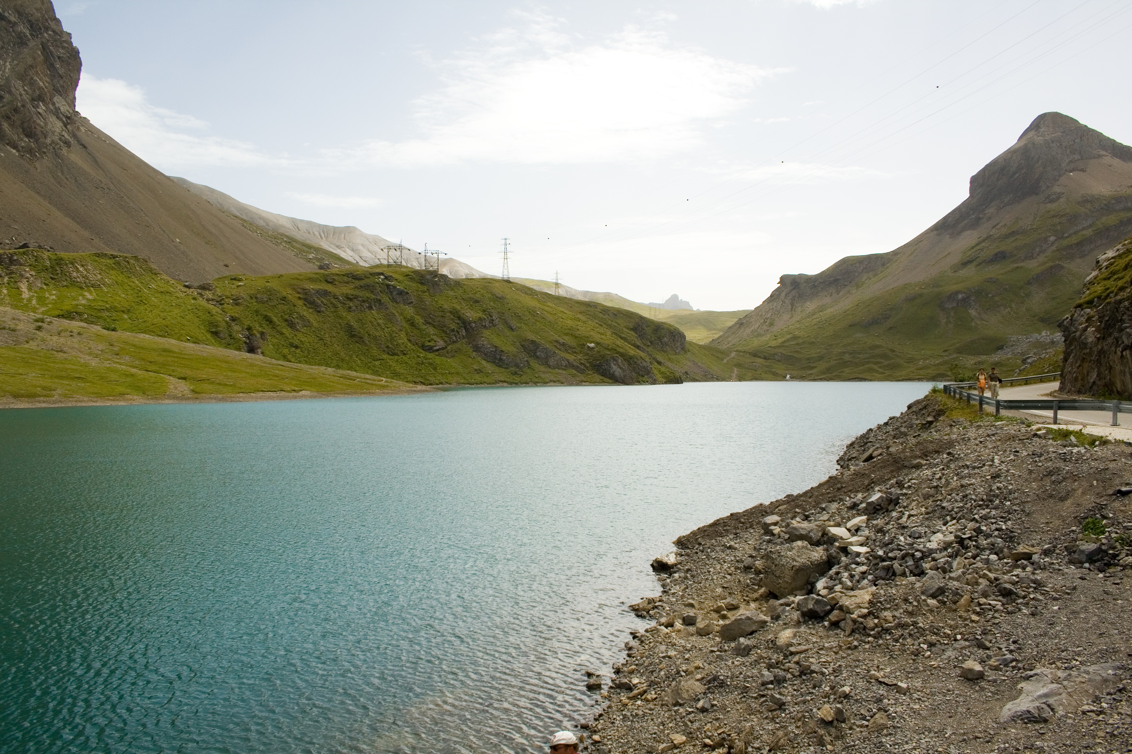 Sanetsch, canton du Valais, Suisse